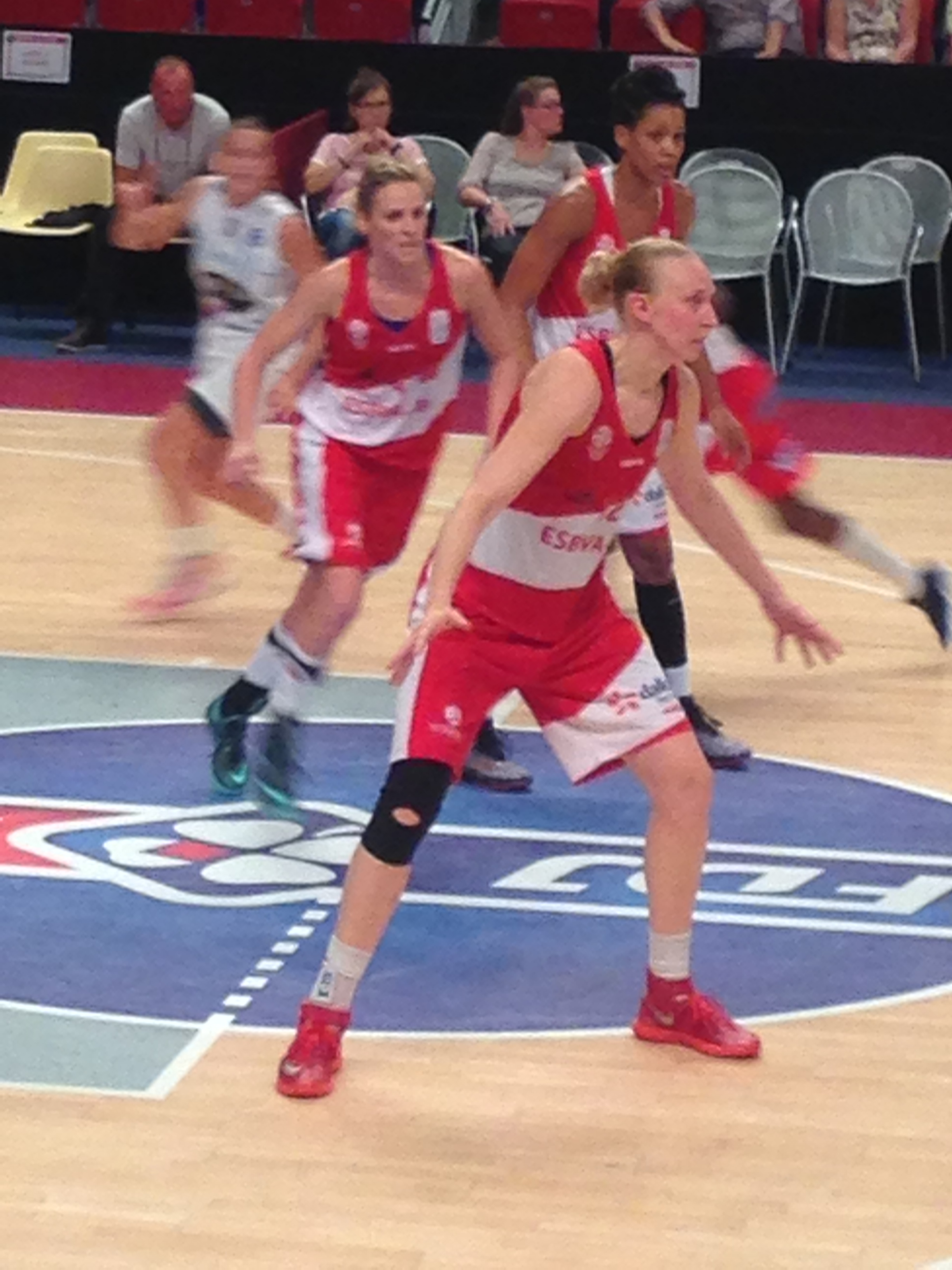 Lors du match Basket Landes / Villeneuve-d'Ascq à l'Open LFB 2014, Ann Wauters en défense